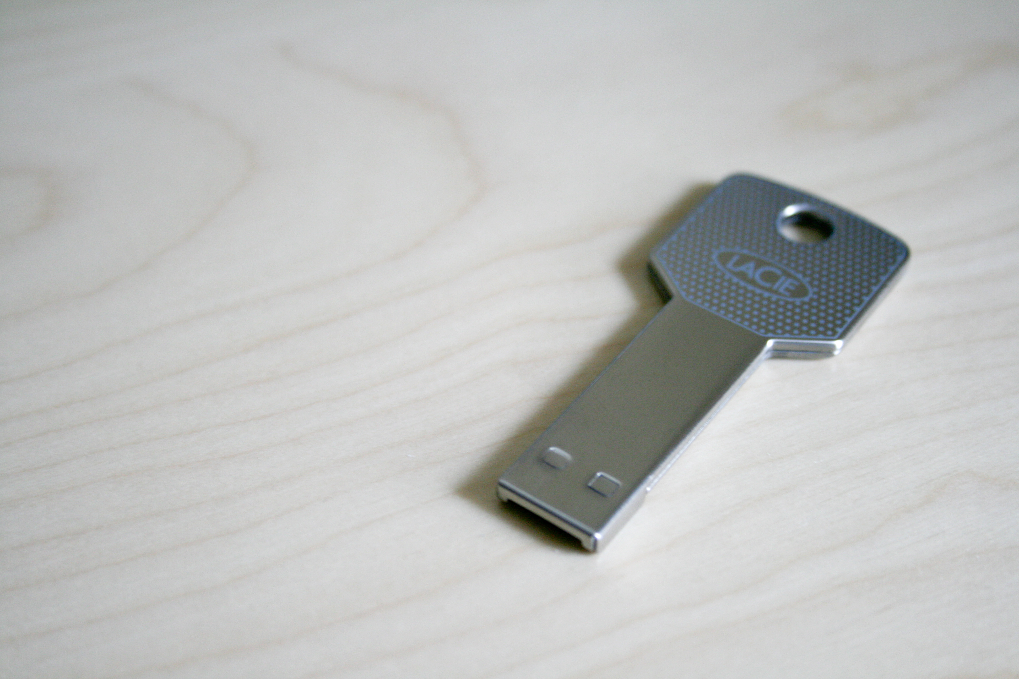 LaCie zibatmia